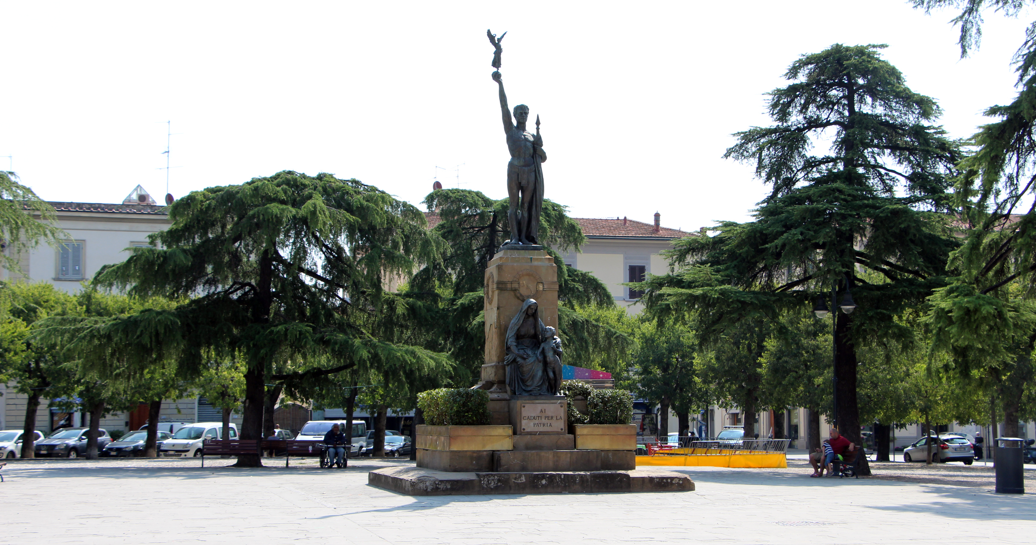 Sesto Fiorentino